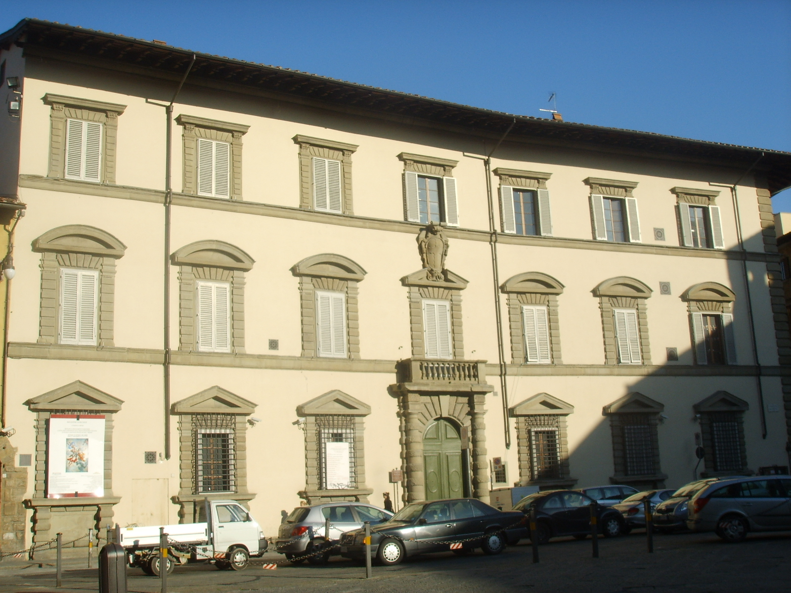 Palazzo Sacrati (Guadagni-Strozzi di Mantova) in Piazza del duomo, florence